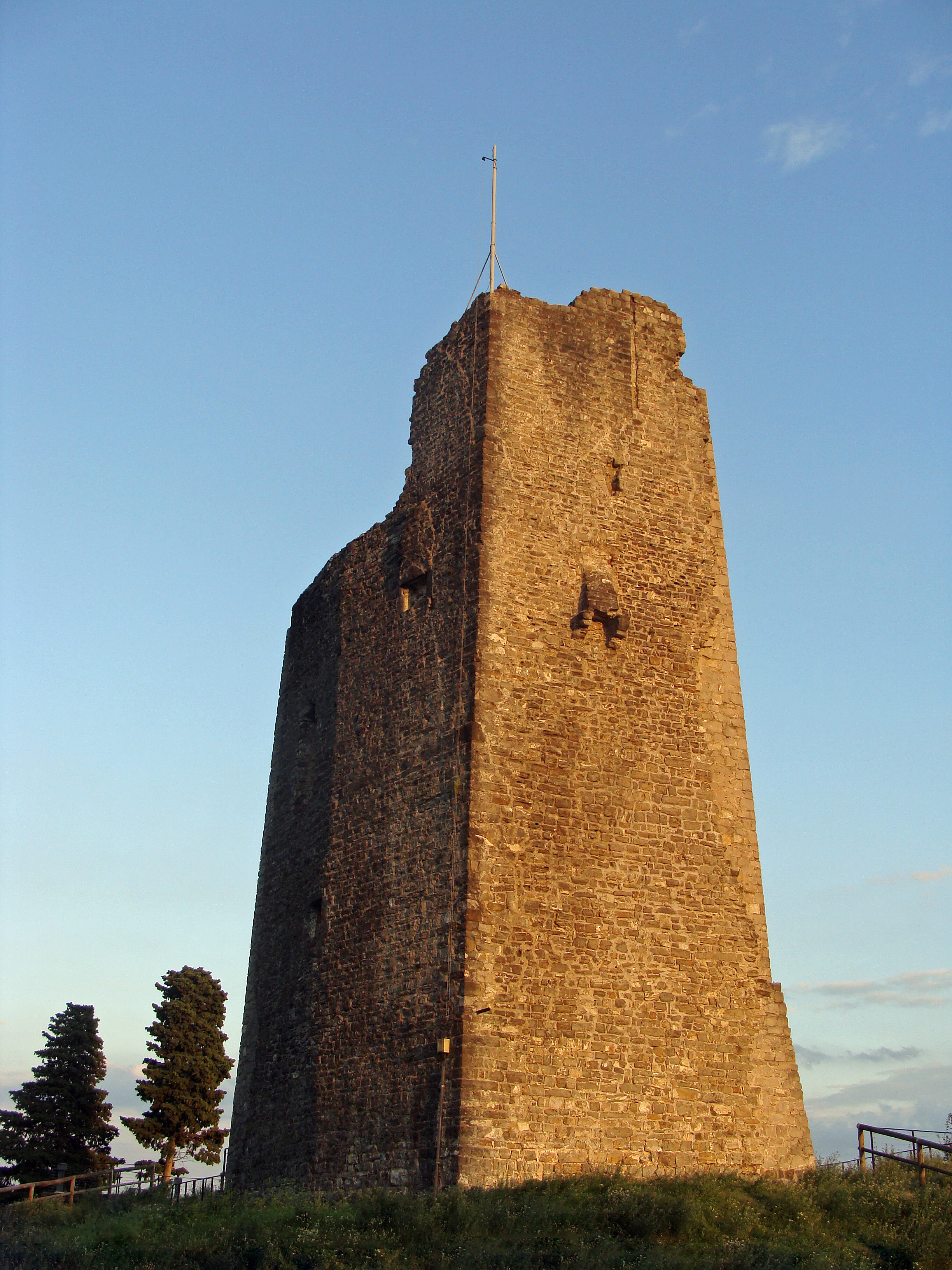 château médiéval de Tarcento (Italie) appelé Castello Frangipane. Vue du donjon (2012).